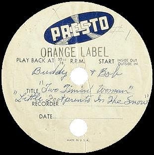 Es una foto de una de las primeras grabaciones de Buddy Holly, "My Two Timin' Woman" en un disco de acetato.